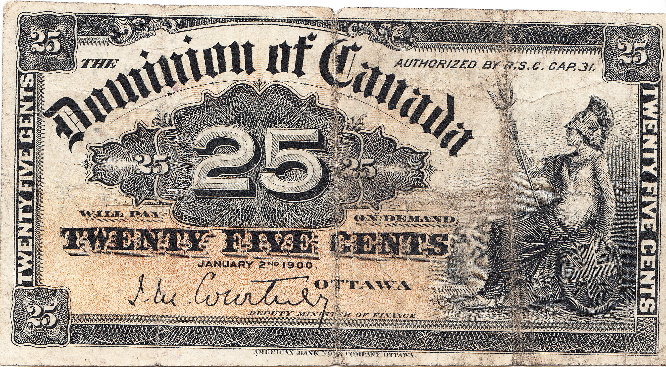 Billet canadien de 0,25$, deuxième émission (1900)